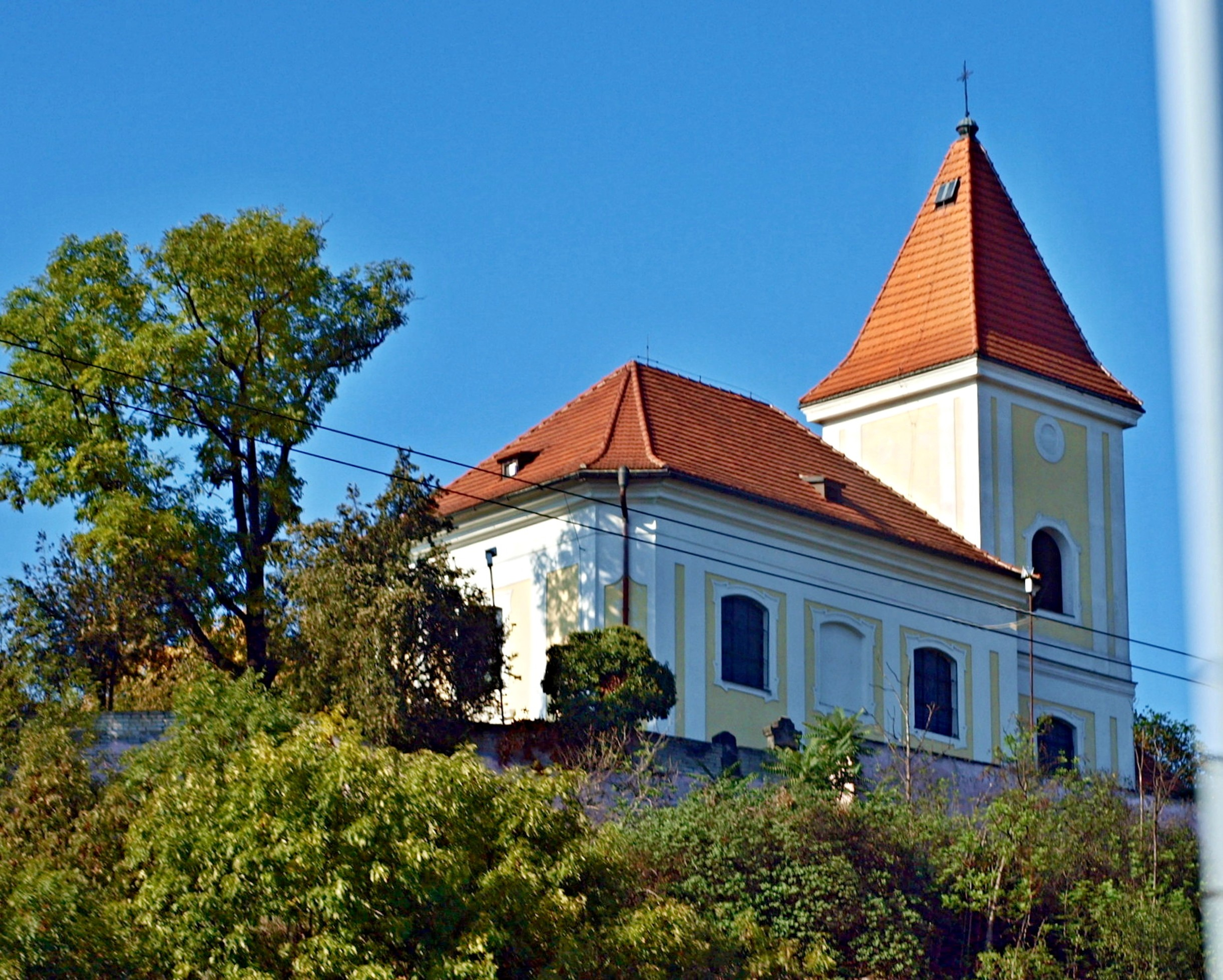 Kostel svatých Filipa a Jakuba na Zlíchově